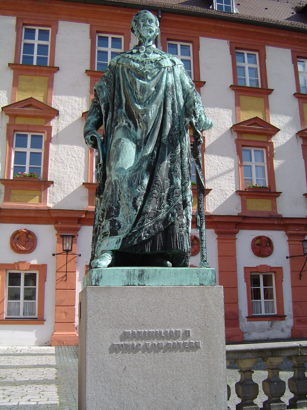 Bayreuth, König Maximilian II-Denkmal. Granitsockel mit Galvanoplastik, Entwurf von F. Brugger, gegossen von Ferdinand von Miller 1860.